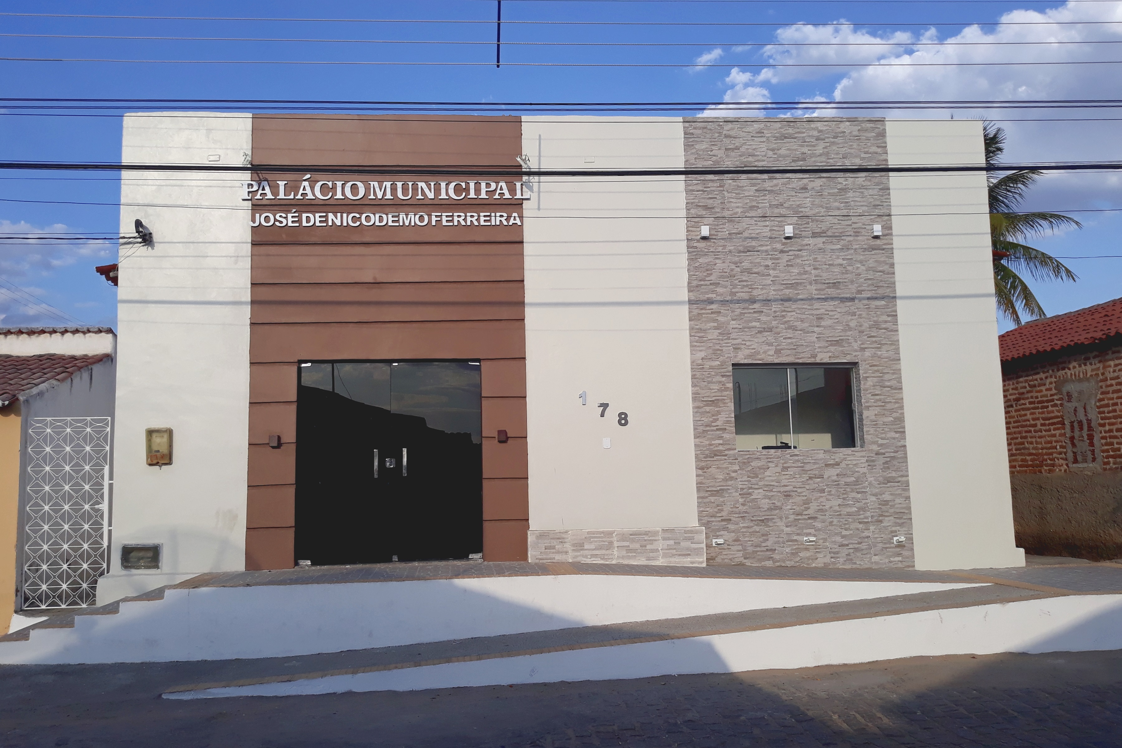 Palácio Municipal José de Nicodemo Ferreira, sede da prefeitura de Rafael Fernandes, no Rio Grande do Norte (Brasil)